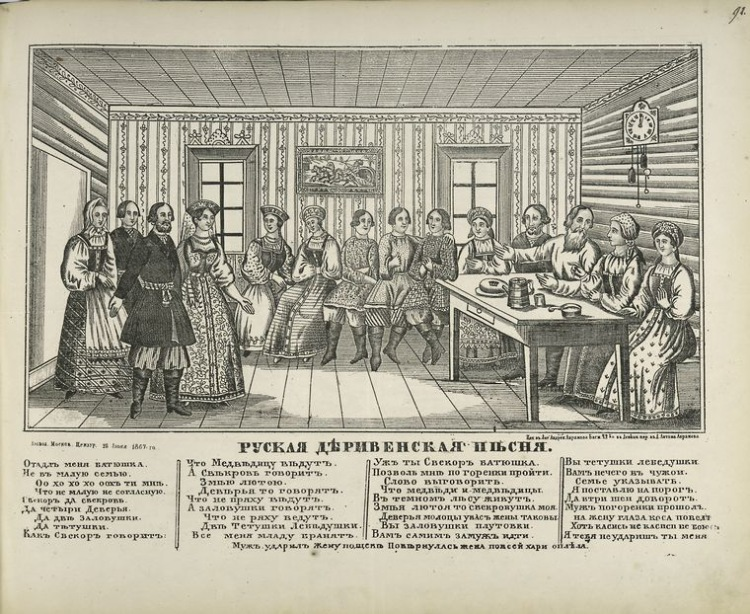 Отдал меня батюшка (русская деревенская песня). Лубок